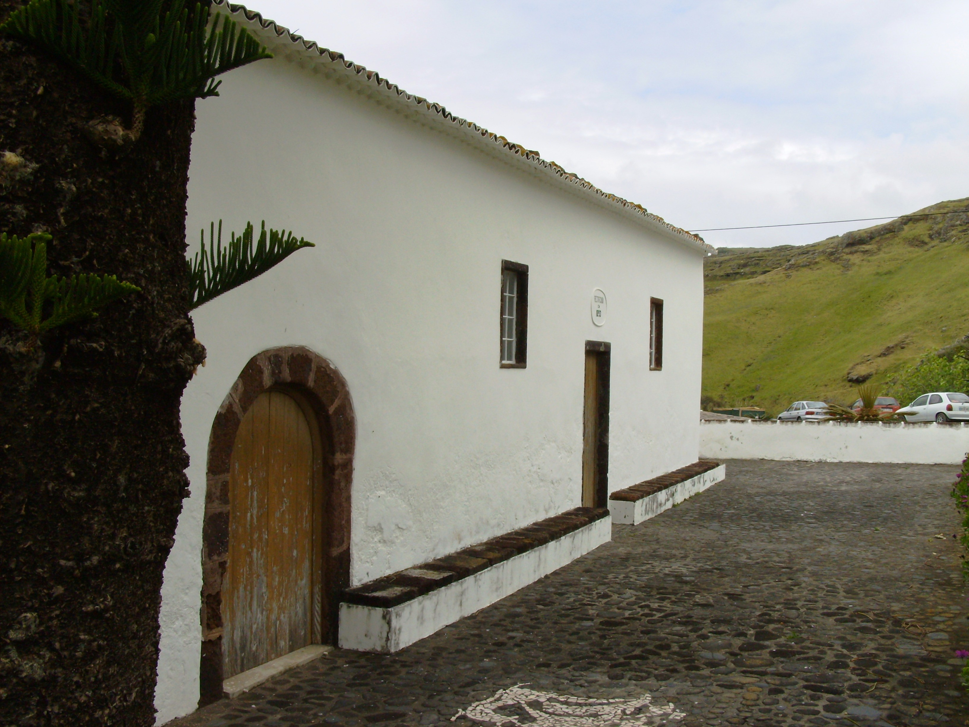 Ermida de Nossa Senhora dos Anjos, Ilha de Santa Maria (Açores), Portugal.